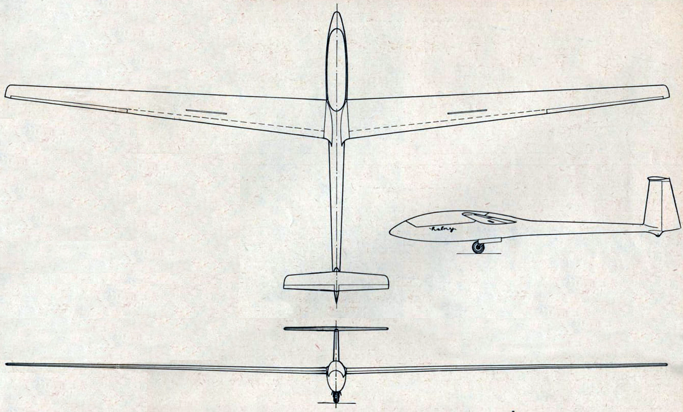 Rzuty szybowca SZD-40